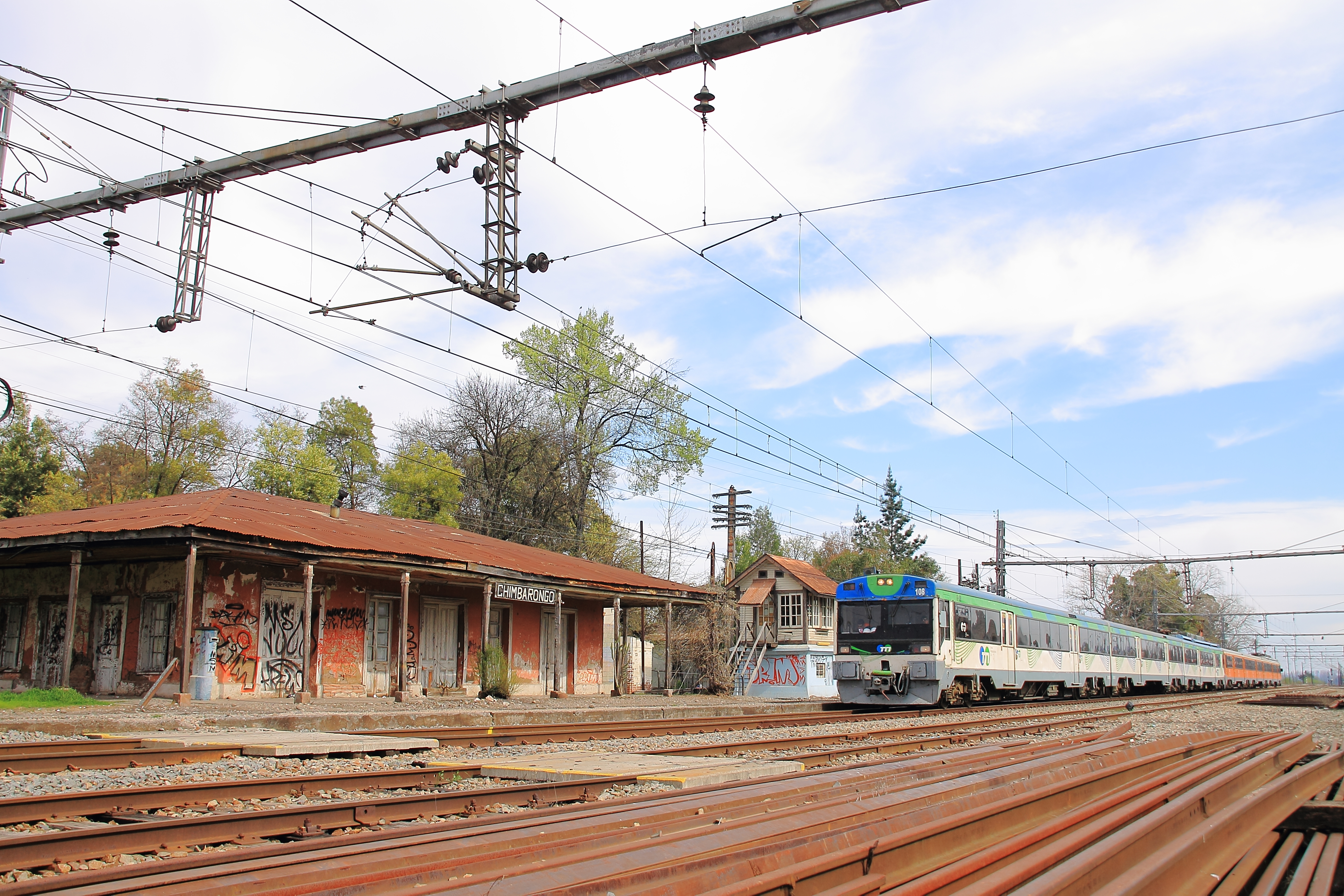 En doble tracción, el servicio especial "económico" haciendo su paso por la antiquísima estación de Chimbarongo, construccion de estilo colonial, que aun se mantiene en pie, pese al abandono y al paso de los años. Tren destino Alameda, formado por los automotores UT440-108 /UT440-201 ambos asignados al servicio Expreso Maule, que por estos días se encuentra suprimido por trabajos del Nos Express. Chimbarongo, Septiembre 2015